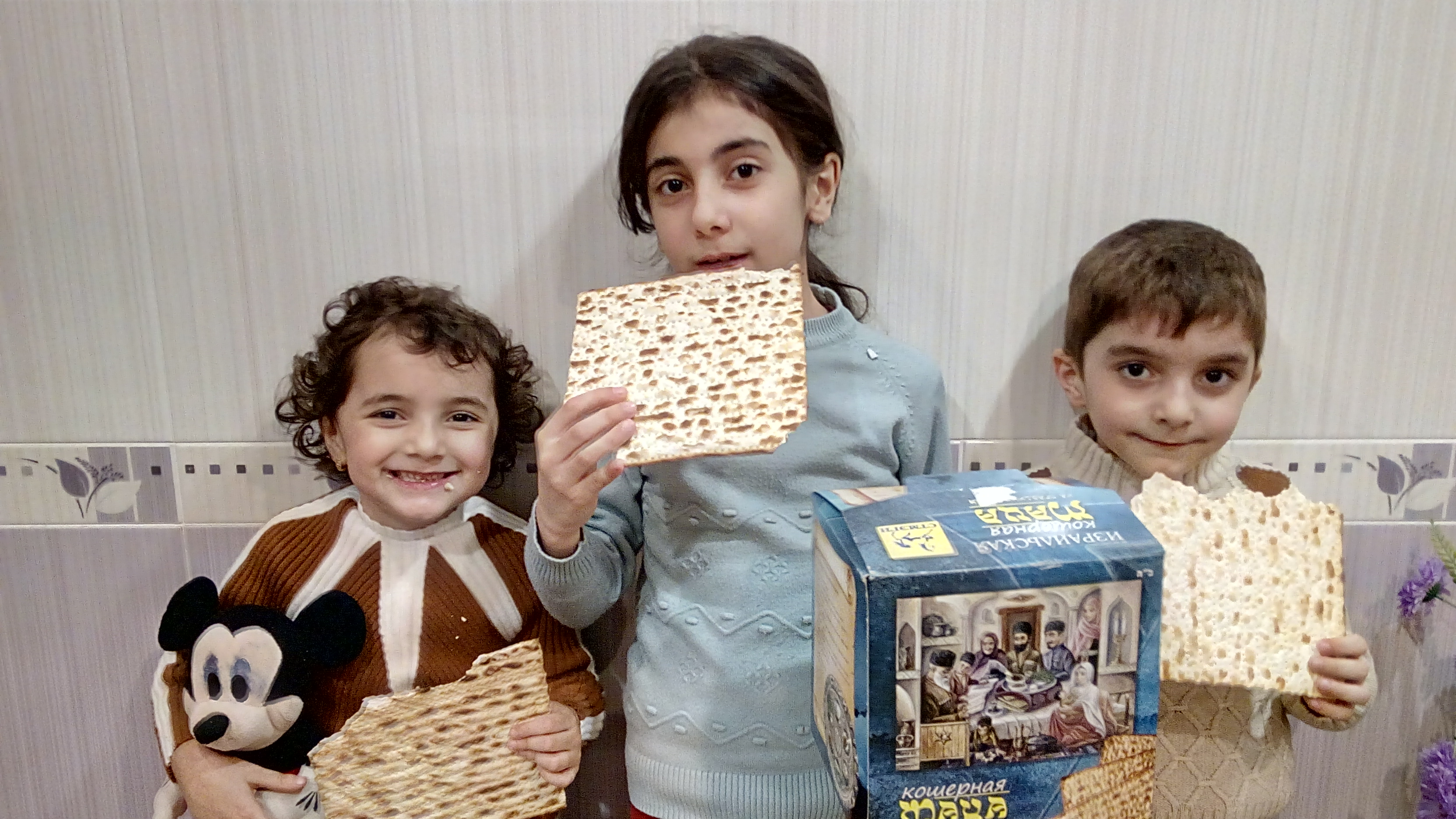 Matsa yeyən cekli uşaqlar